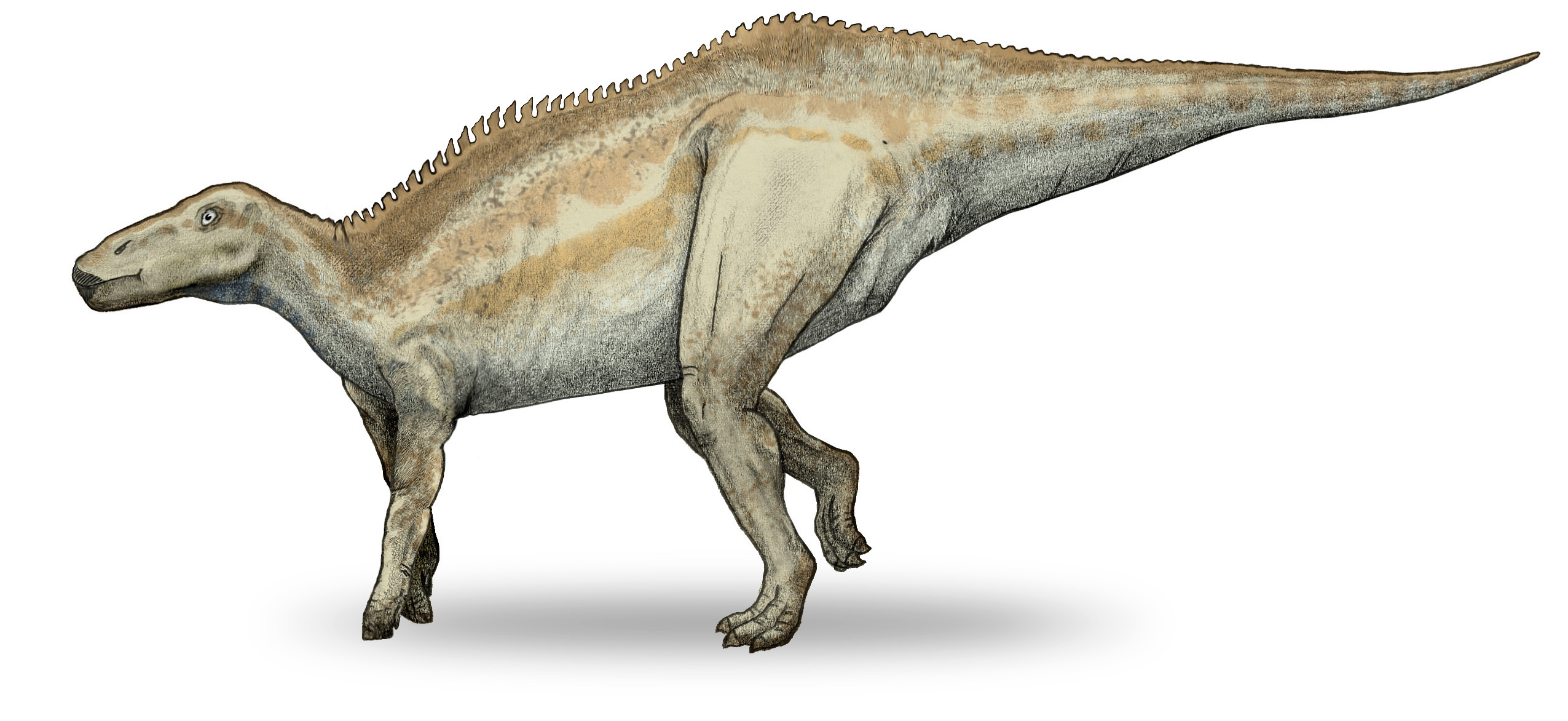 Shantungosaurus